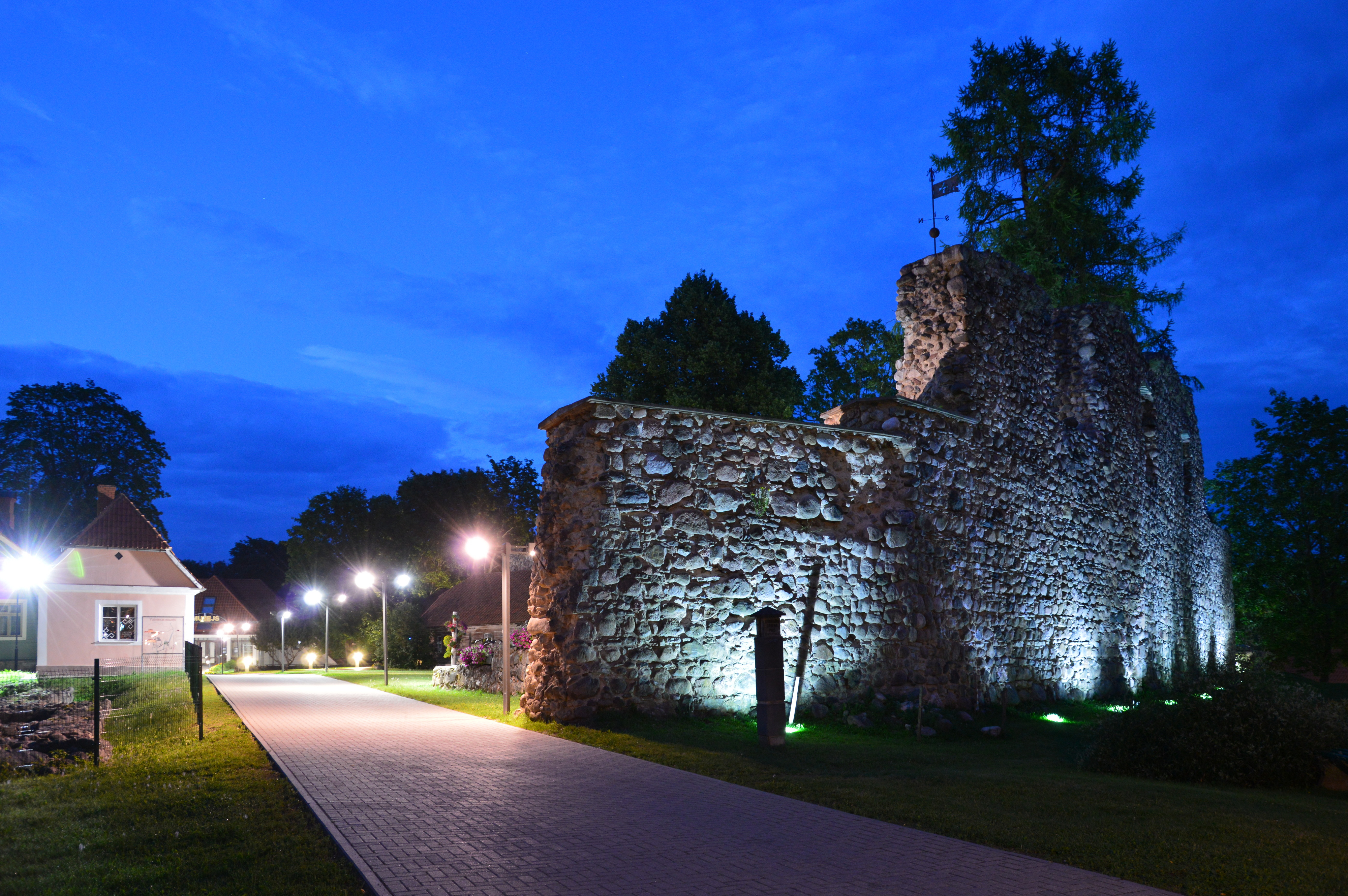 Valmiera ordulinnuse varemed hilisõhtul.